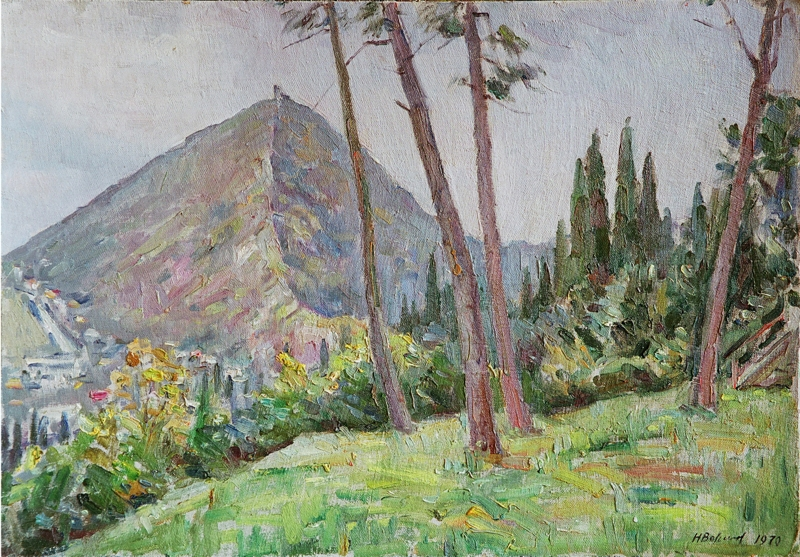 Новый Афон, Абхазия